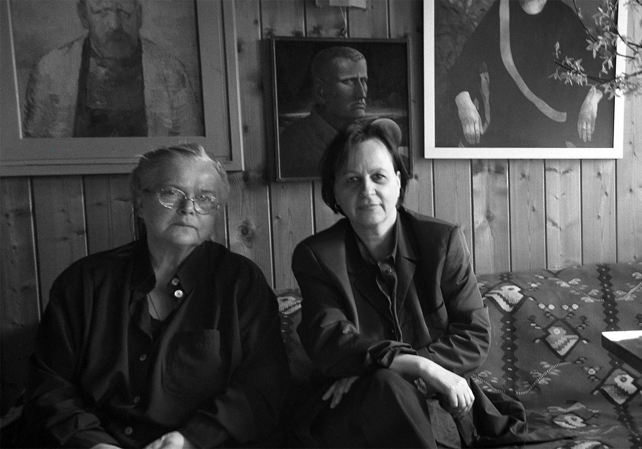 Eva Strittmatter (links) und Rengha Rodewill Schulzenhof bei Dollgow © Micaela Porcelli / Agentur Wort + Kunst